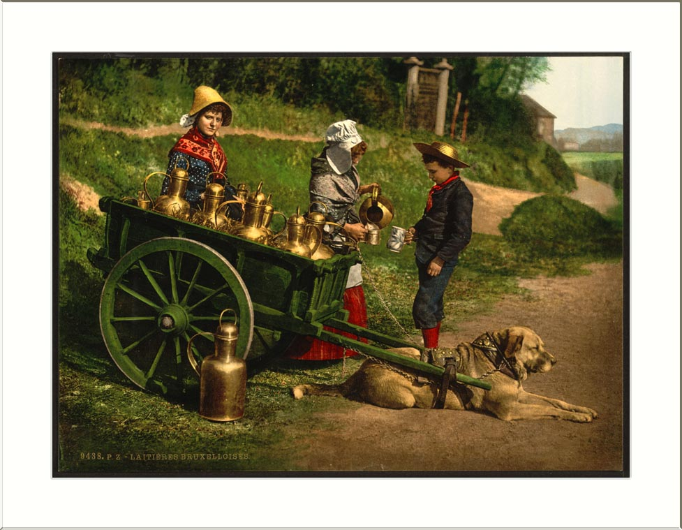 Milksellers Brussels Belgium